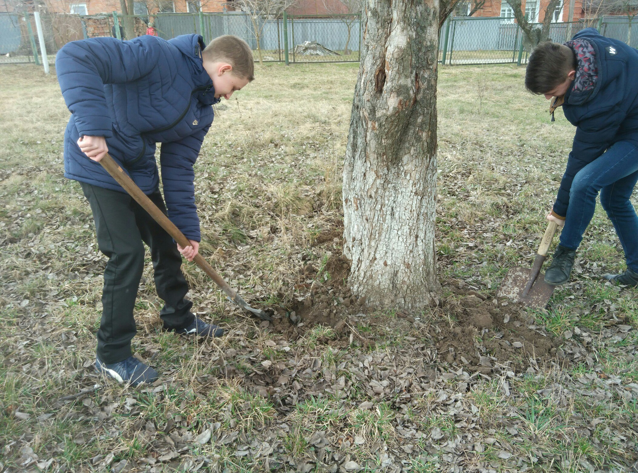 обкопування дерев в парку Веретинівський